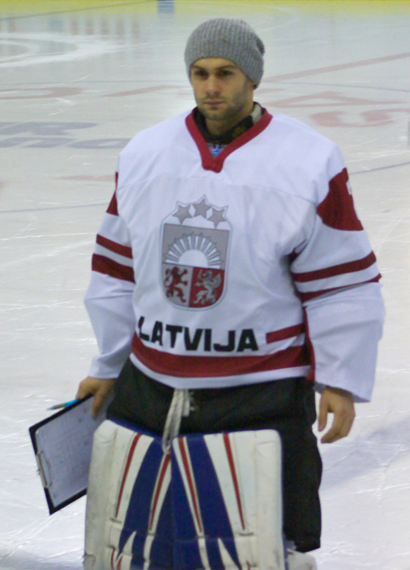 Ivars Punnenovs podczas Mistrzostw Świata Juniorów w Hokeju na Lodzie 2014 I Dywizji w Sanoku, Dania - Łotwa 4:1, Arena Sanok 19 grudnia 2013